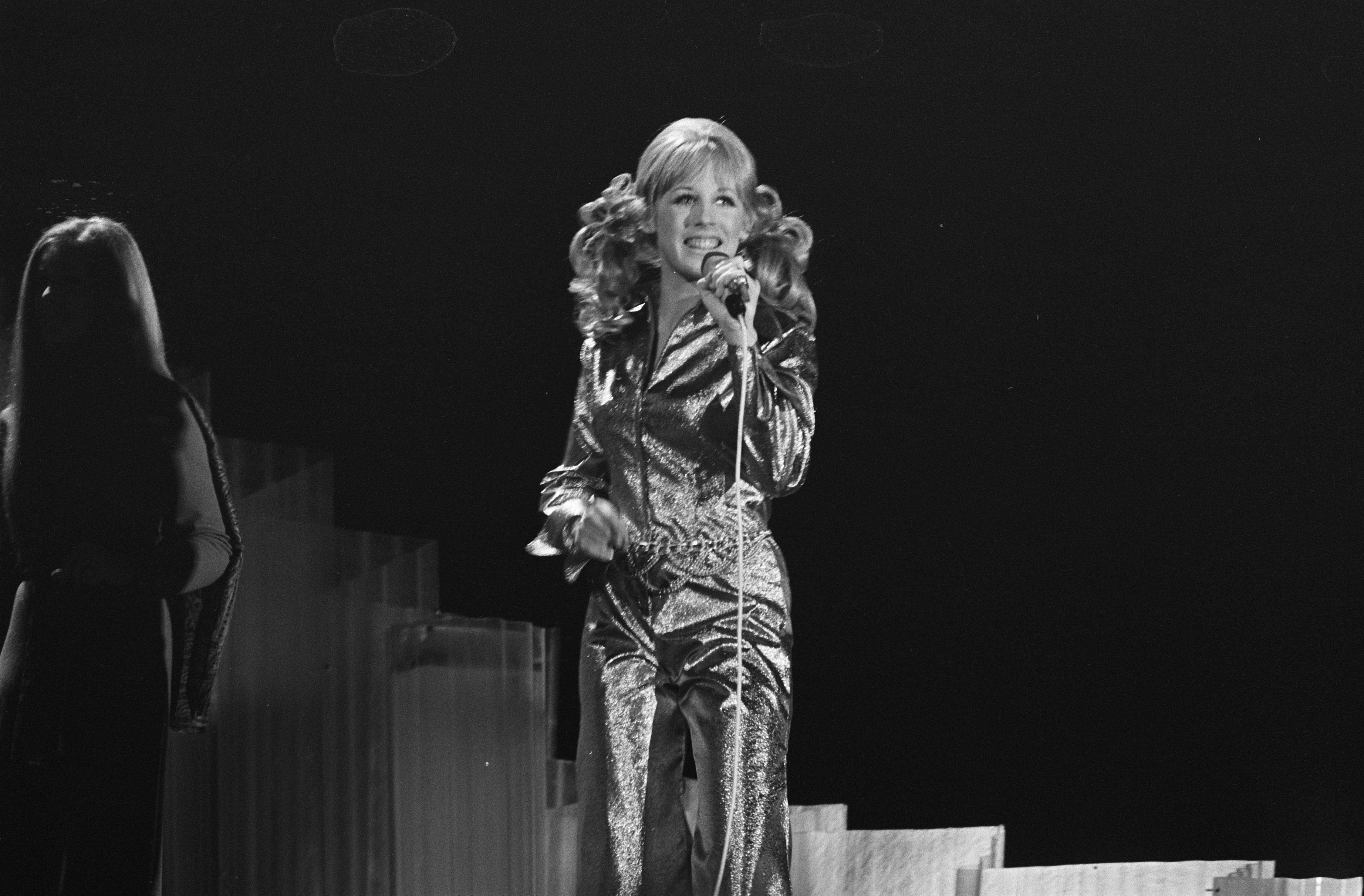 Collectie / Archief : Fotocollectie Anefo Reportage / Serie : [ onbekend ] Beschrijving : Nationale finale Eurovisie Songfestival in Nederlands Congresgebouw in Den Haag: Joke Bruijs Datum : 11 februari 1970 Locatie : Den Haag, Zuid-Holland Trefwoorden : songfestivals, zangers Persoonsnaam : Bruijs, Joke Instellingsnaam : Congresgebouw, Eurovisie Song Festival Fotograaf : Mieremet, Rob / Anefo Auteursrechthebbende : Nationaal Archief Materiaalsoort : Negatief (zwart/wit) Nummer archiefinventaris : bekijk toegang 2.24.01.05 Bestanddeelnummer : 923-2483